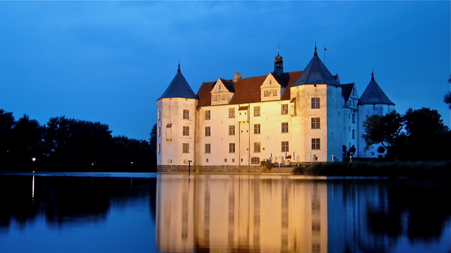 Schloß Glücksburg